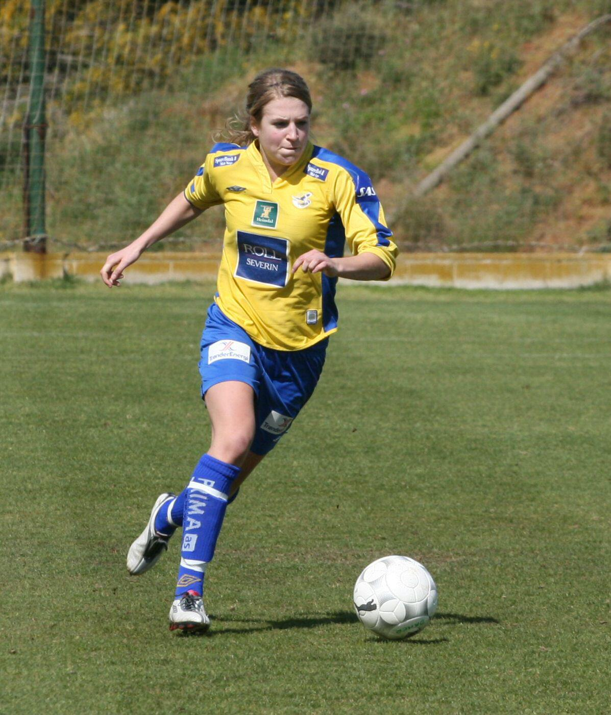 Fotballspilleren Camilla Åseng